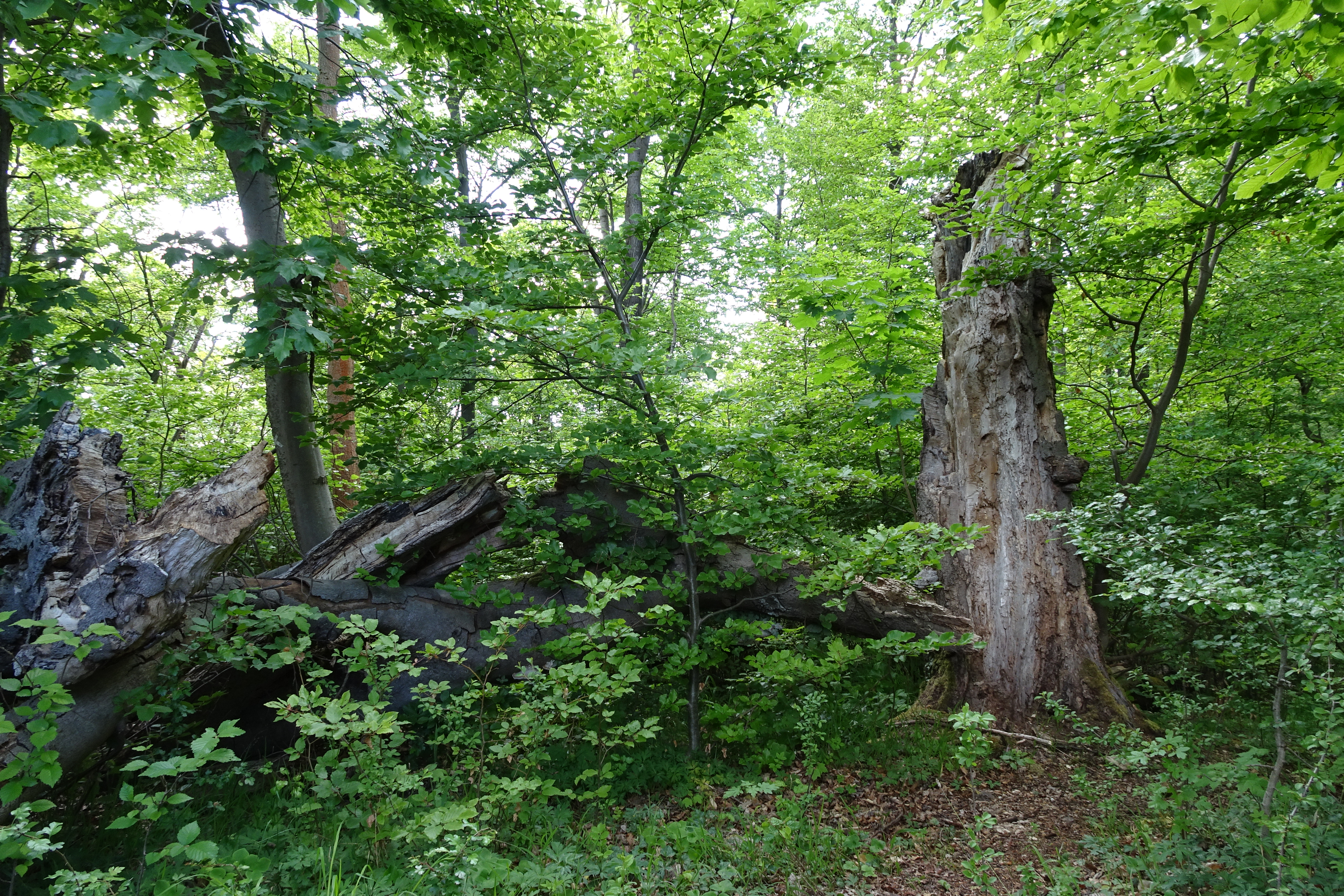 Das Naturschutzgebiet „Dreiherrenstein-Eschenberg-Kreutzerberg“ liegt im nordhessischen Werra-Meißner-Kreis und erstreckt sich entlang der Landesgrenze zu Thüringen. Das von Bergen mit steilen Hängen, Felsen und Bergstürzen geprägte Gebiet besitzt naturnahe Buchenwälder, Felsfluren, Feuchtwiesen und extensiv bewirtschaftete Offenlandbereiche. Als national bedeutsam für den Schutz seltener und bestandsgefährdeter Tier- und Pflanzenarten der Kalkbuchenwälder eingestuft, wurde der Bereich im Frühjahr 1998 zum Naturschutzgebiet erklärt und später als ein Teilbereich des Flora-Fauna-Habitat-Gebiets „Kalkberge bei Röhrda und Weißenborn“ in dem europaweiten Netz von Schutzgebieten „Natura 2000“ verankert. Das Naturschutzgebiet ist 209,38 Hektar groß, hat die nationale Kennung 1636036 und den WDPA-Code 318304.